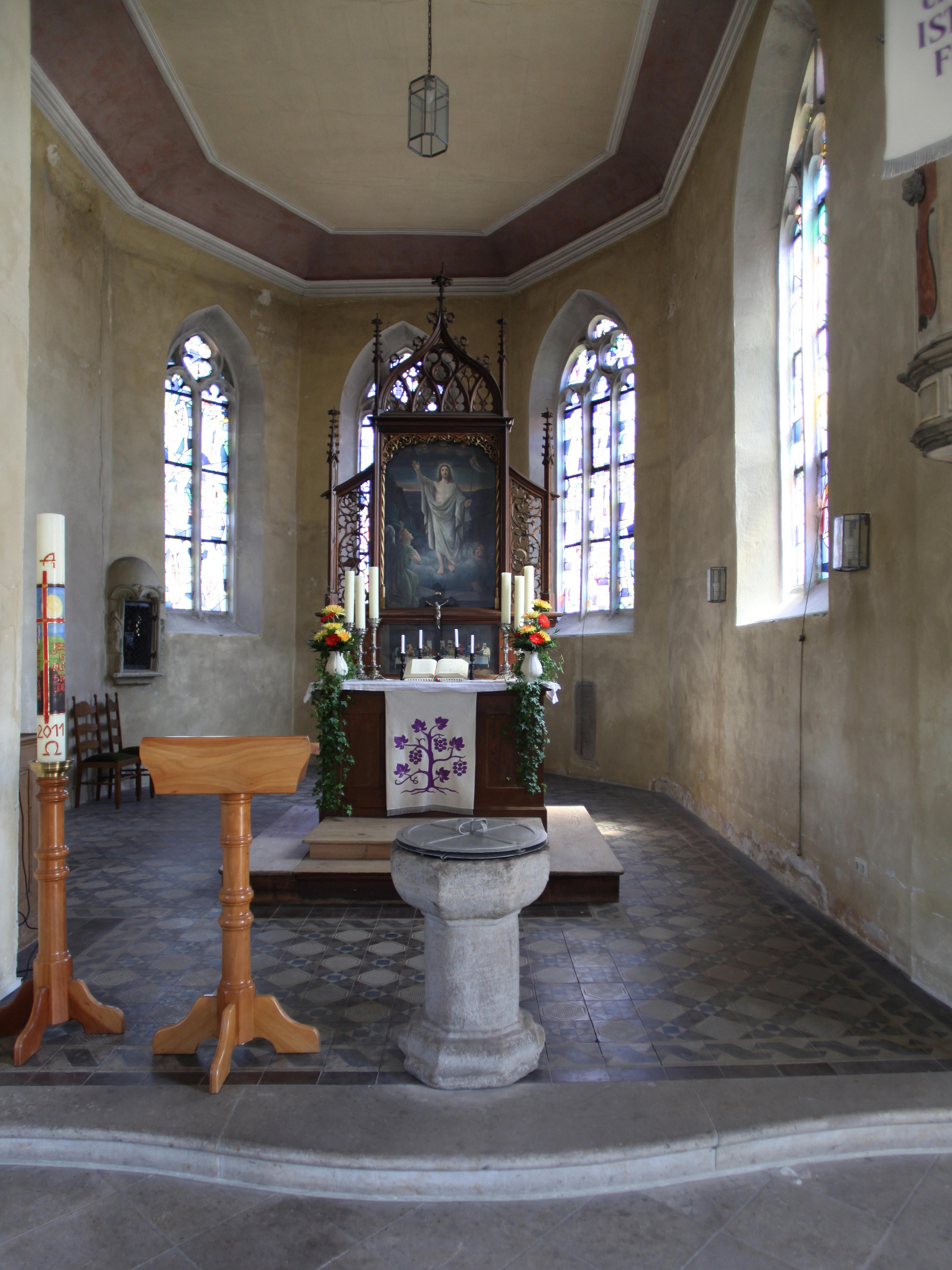 Ev. Johanneskirche, Gemünda, Landkreis Coburg